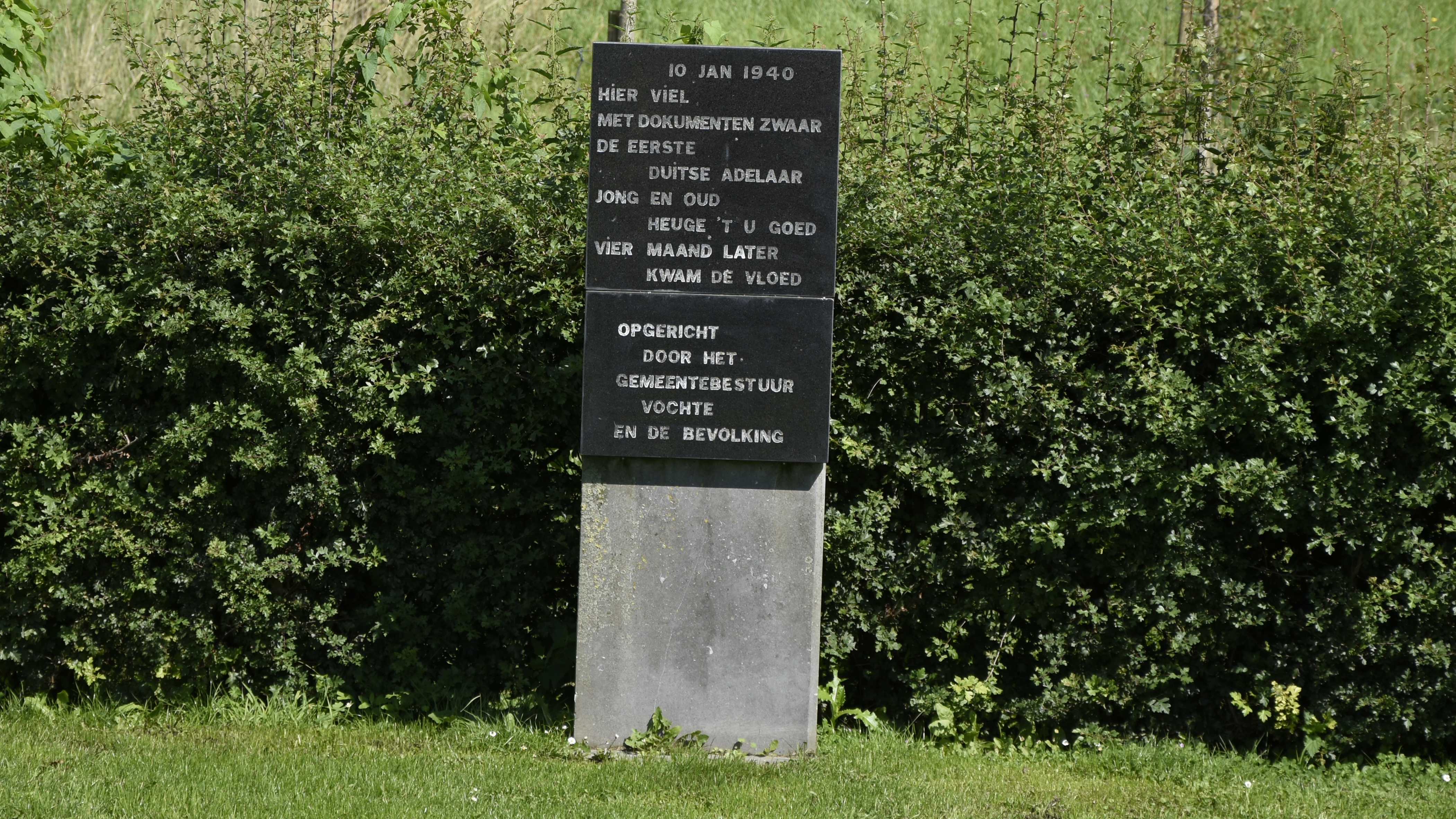 Monument Messerschmitt Bf 108 te Vucht, België